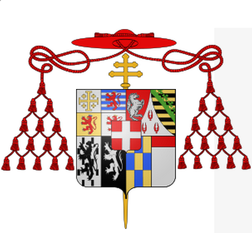 stemma di maurizio di savoia